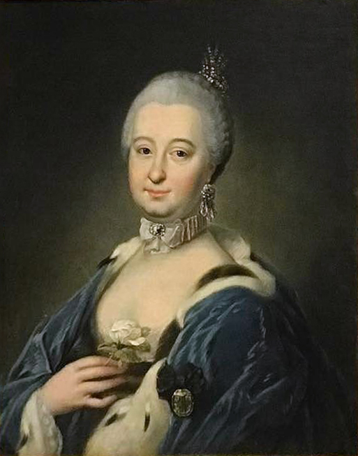 Беларуская (тарашкевіца): Партрэт Ганны Людвікі Радзівіл (Hanna Ludvika Radzivił) з роду Мыцельскіх (Mycielski)